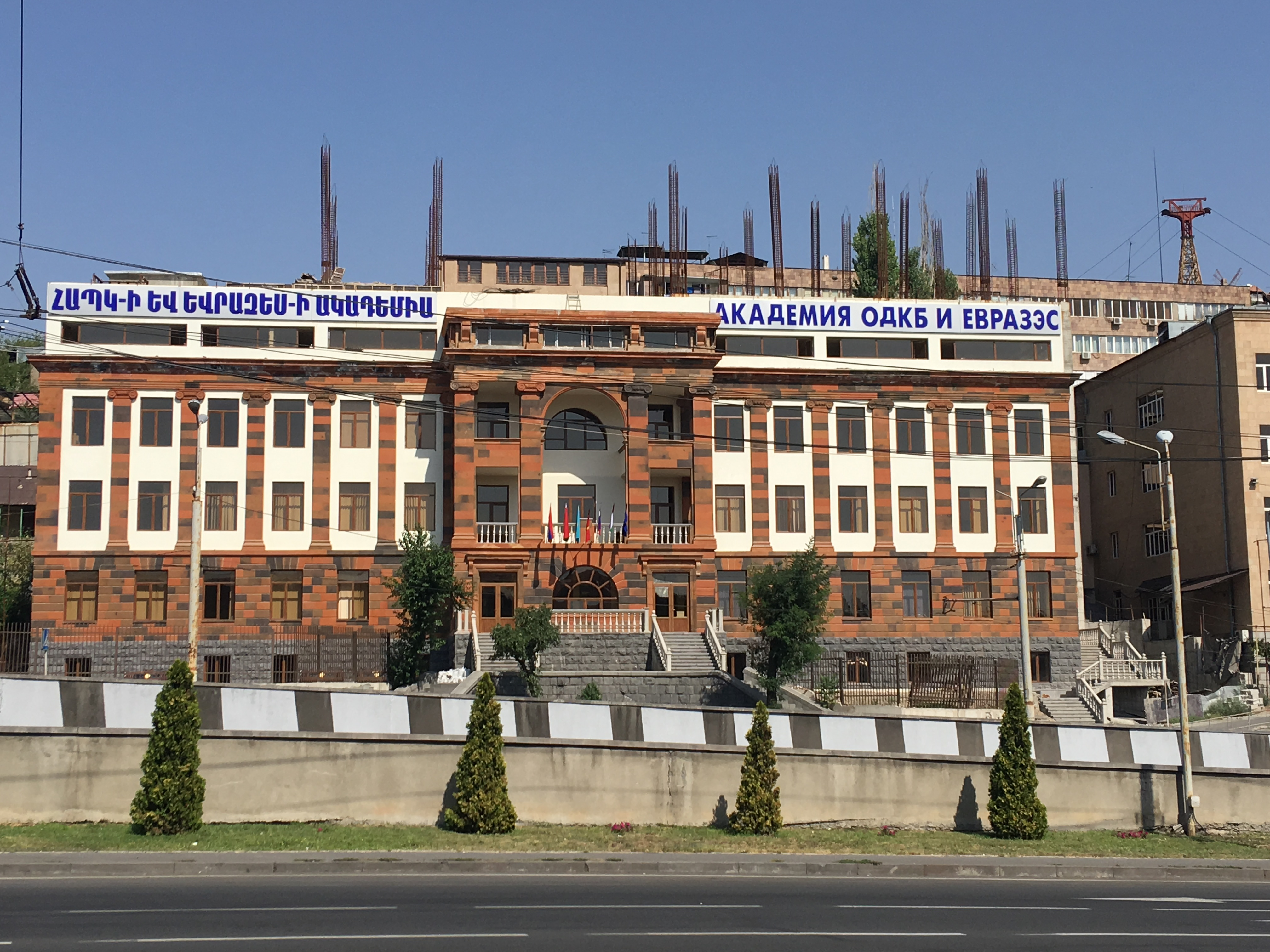 Հավաքական անվտանգության պայմանագրի կազմակերպության ակադեմիայի շենքը, Երևան, Հայաստան